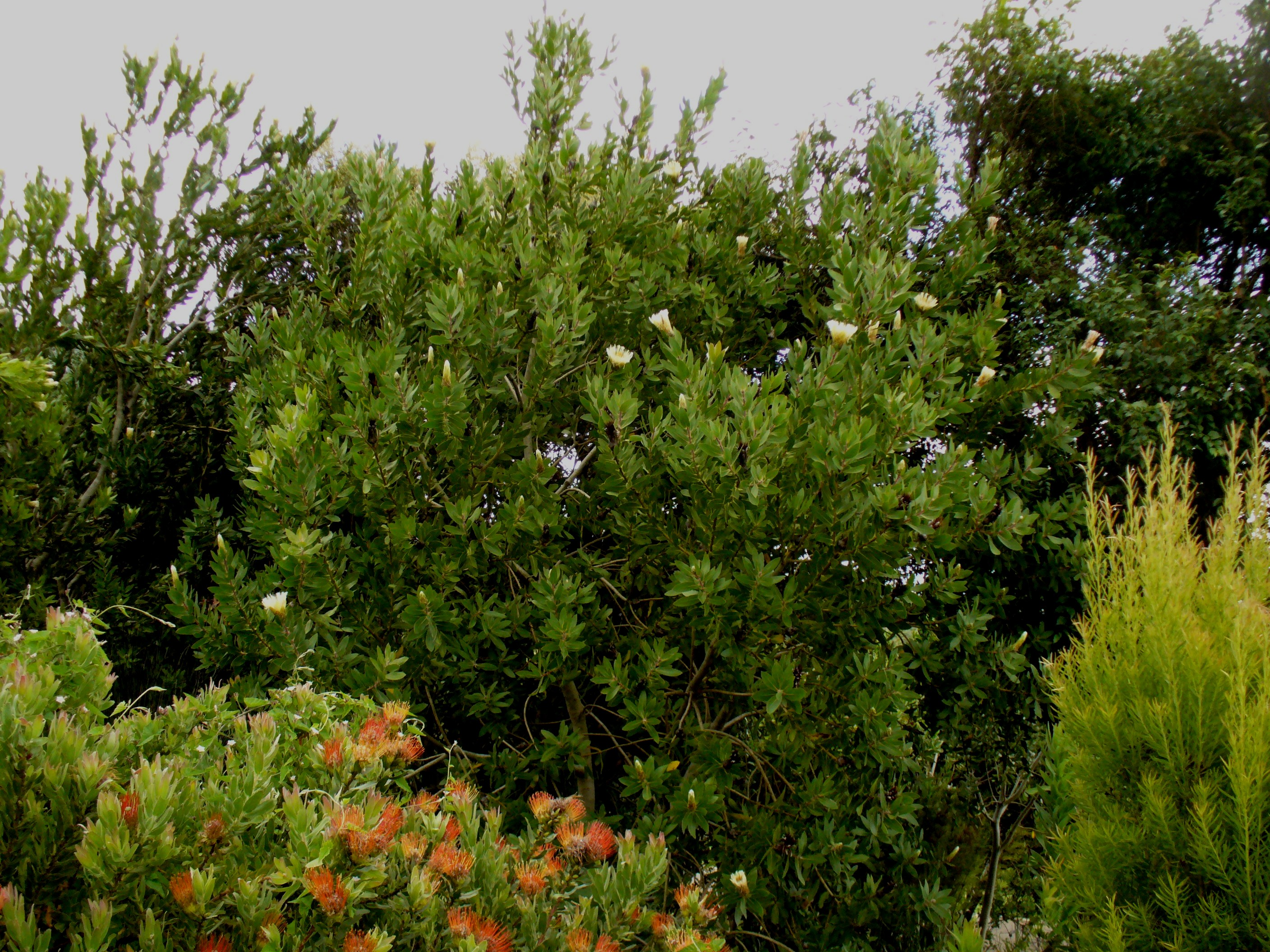 Protea mundii bush